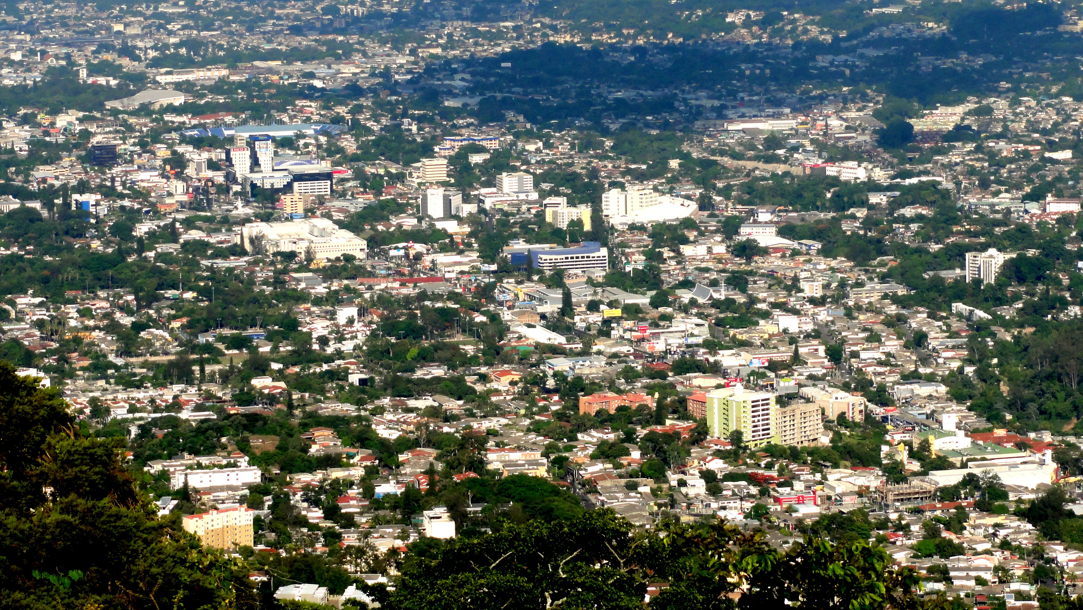 El Salvador - San Salvador